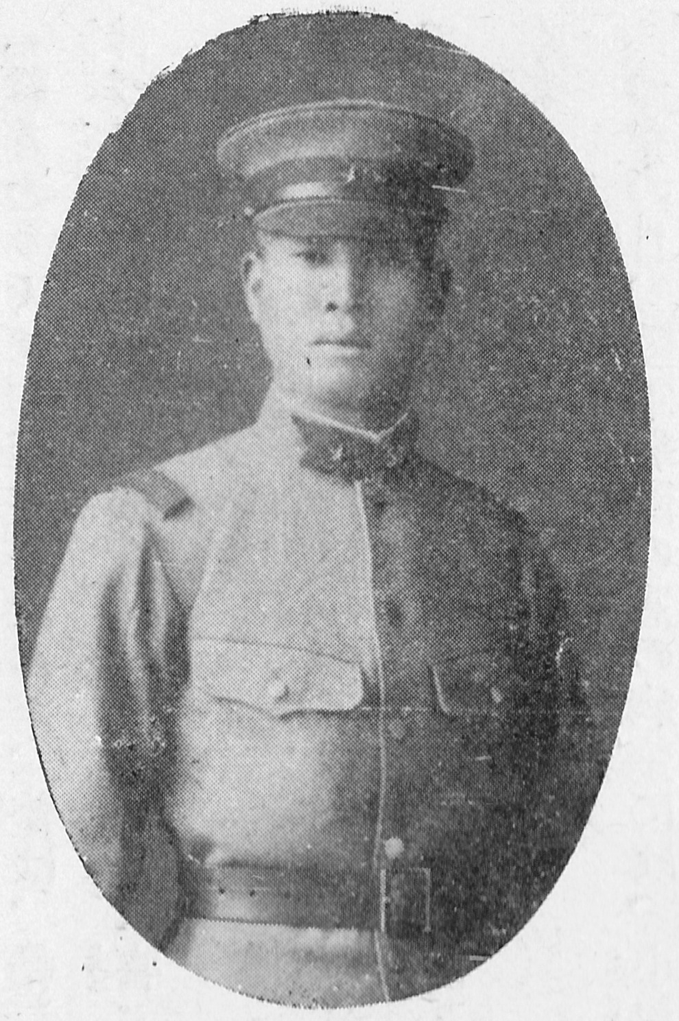 陸士在籍中。